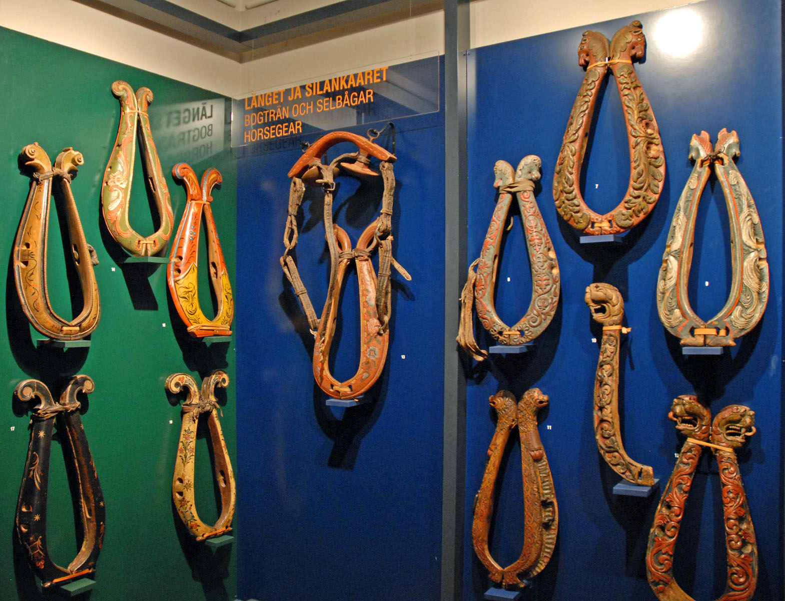 Colliers de chevaux en bois ouvragés et décorés Le Musée national de Finlande présente l'histoire de ce pays depuis la Préhistoire jusqu'à nos jours. Il comprend une importante partie ethnographique intitulée : "Un territoire et son peuple". Plusieurs salles exposent les croyances et modes d'habitat, les modes de vie traditionnels, les savoir-faire, le peuple Sami, l'évolution des costumes, les objets de l'artisanat traditionnel, les meubles.